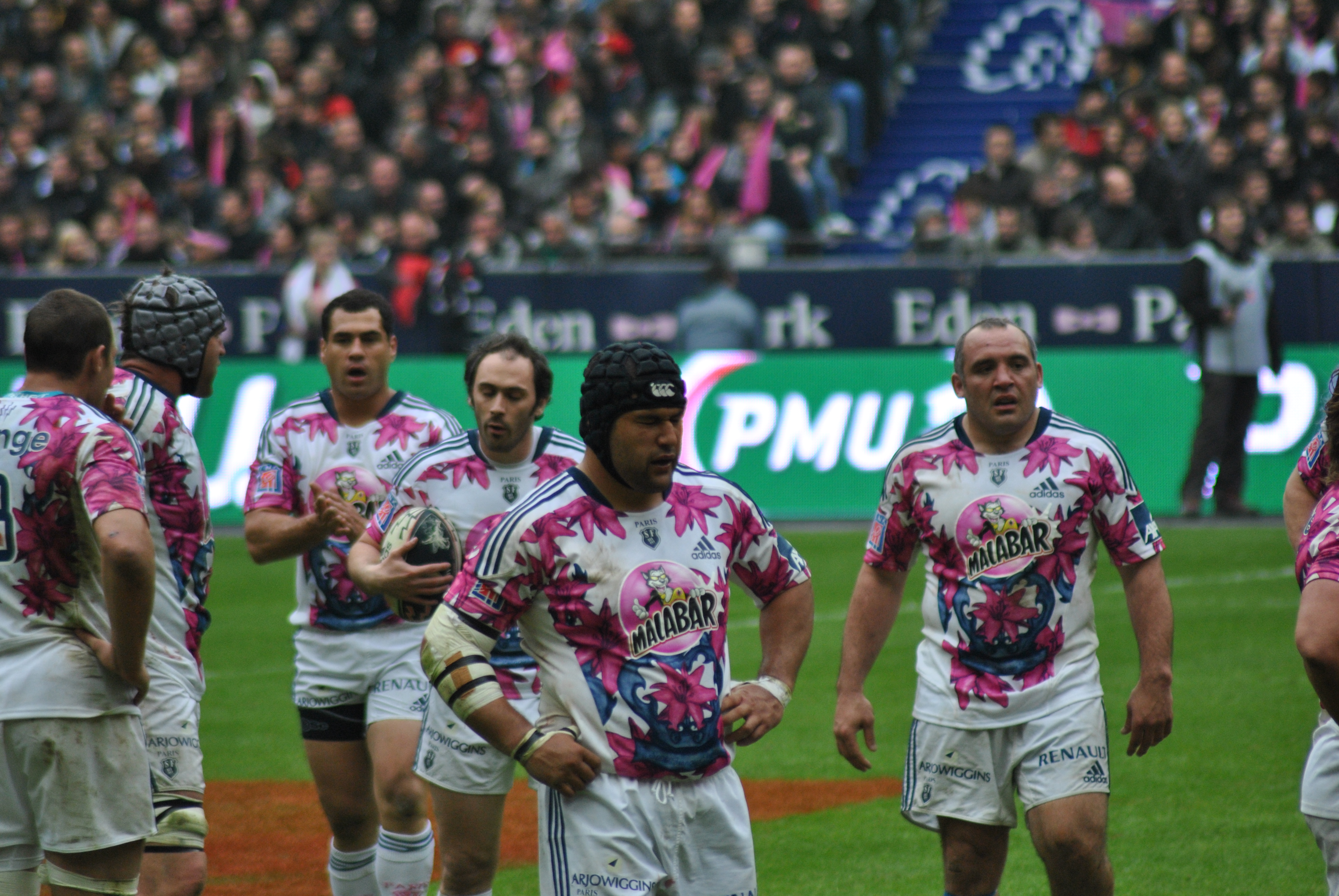 Top14 Stade français contre Stade toulousain le 30 mars 2012